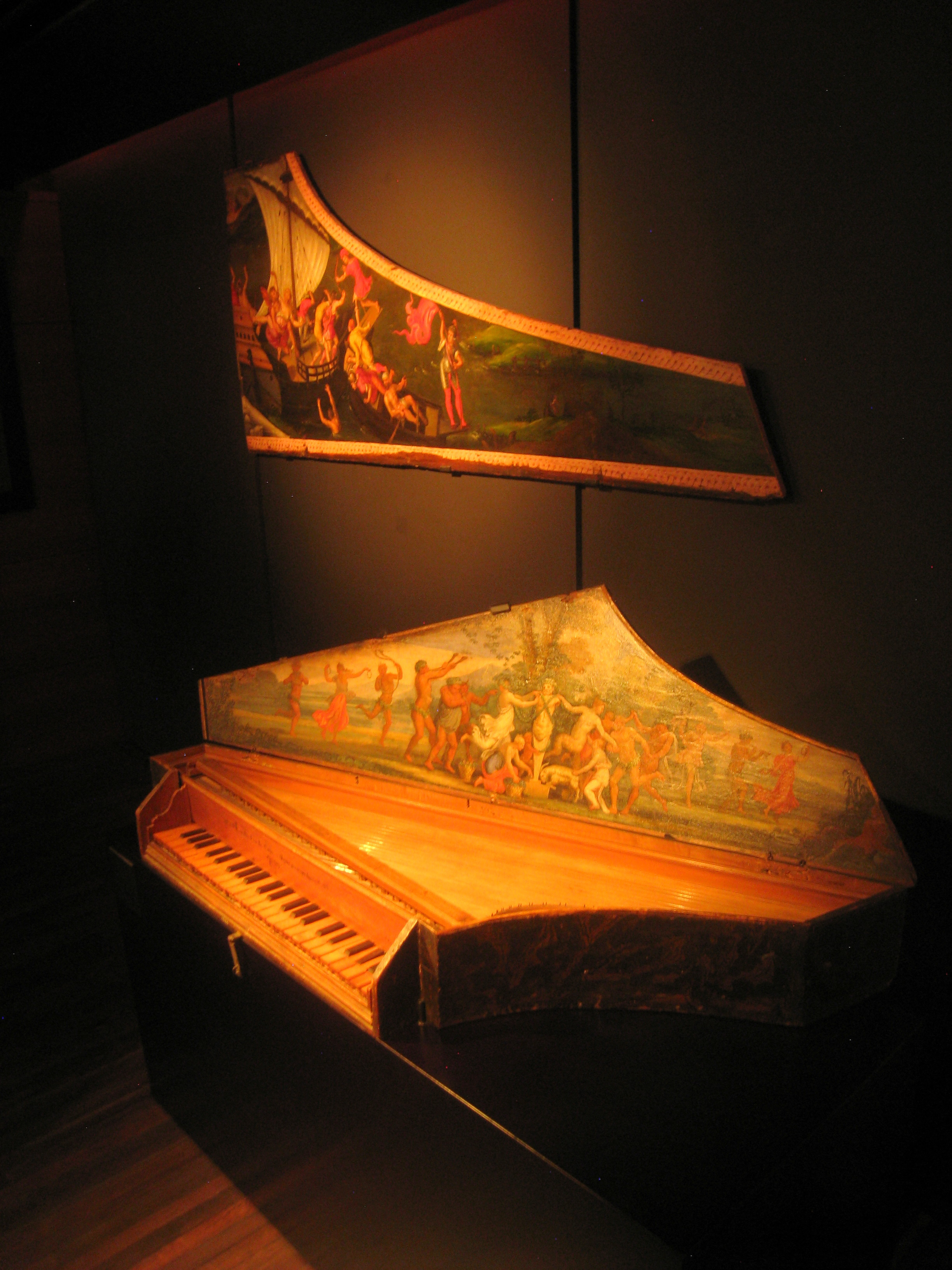 Keyboard instrument in the Musical Instrument Museum, Brussels, Belgium. Girolama de Zenti, Rome, 1637 - spinet.